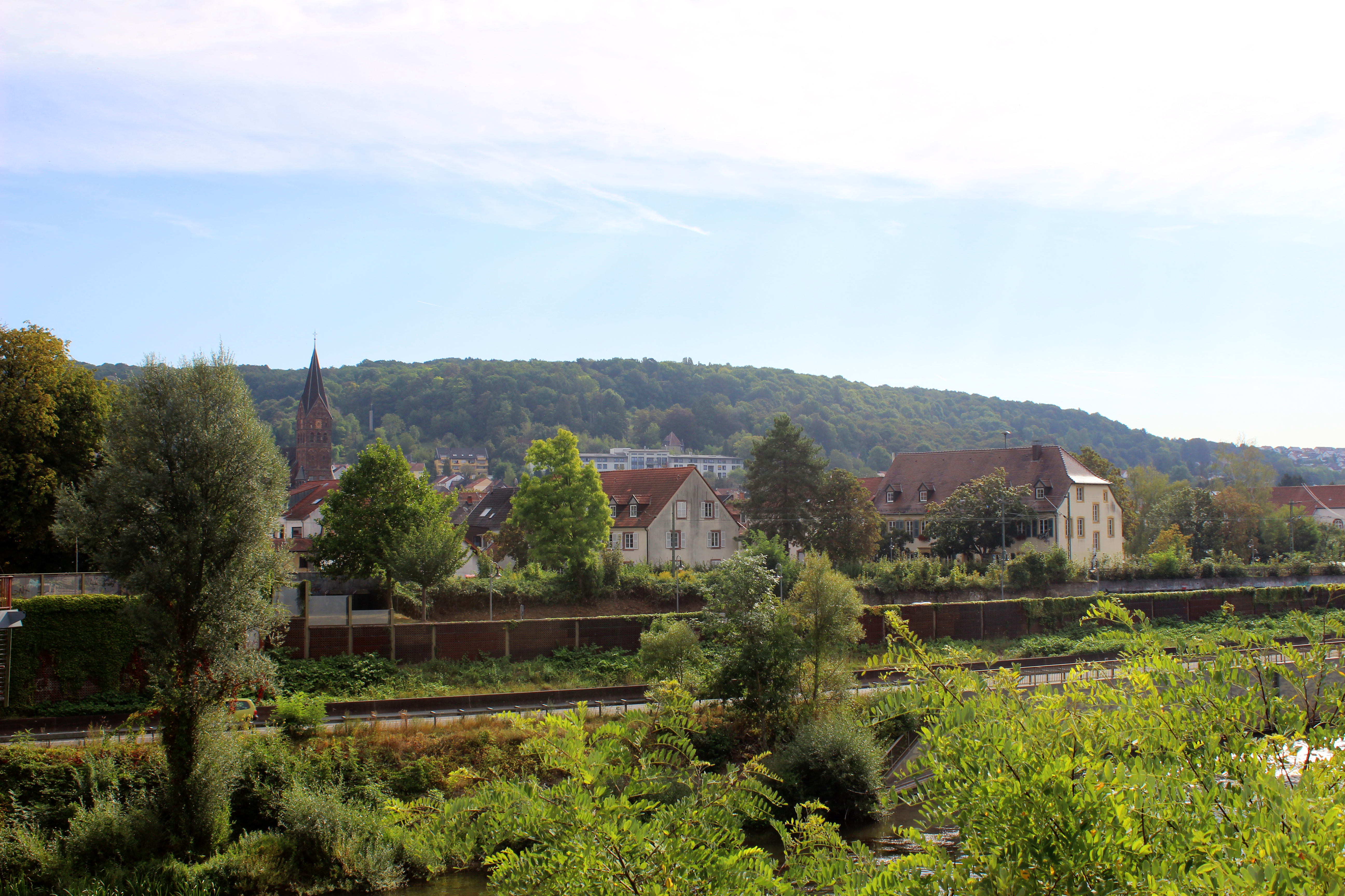 Blick von der Freundschaftsbrücke auf Kleinblittersdorf, Regionalverband Saarbrücken, Saarland